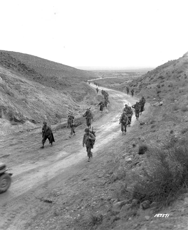 Foto: SC 167571 - 2e Battaljon, 16e Infanterie die de weg vrijmaakte en mijnen ruimde, wandelend door de Kasserine Pass, Tunesie .26 Feb 1943.Photograaf: McGray.